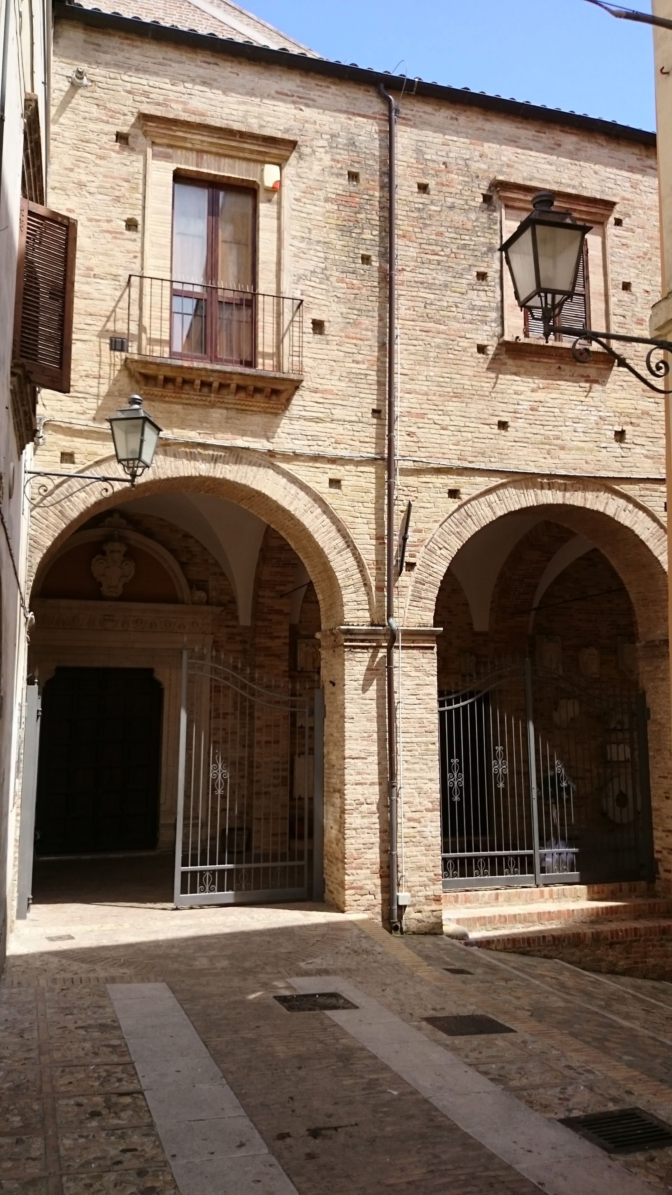 Loreto Aprutino